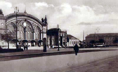 1920 Old images